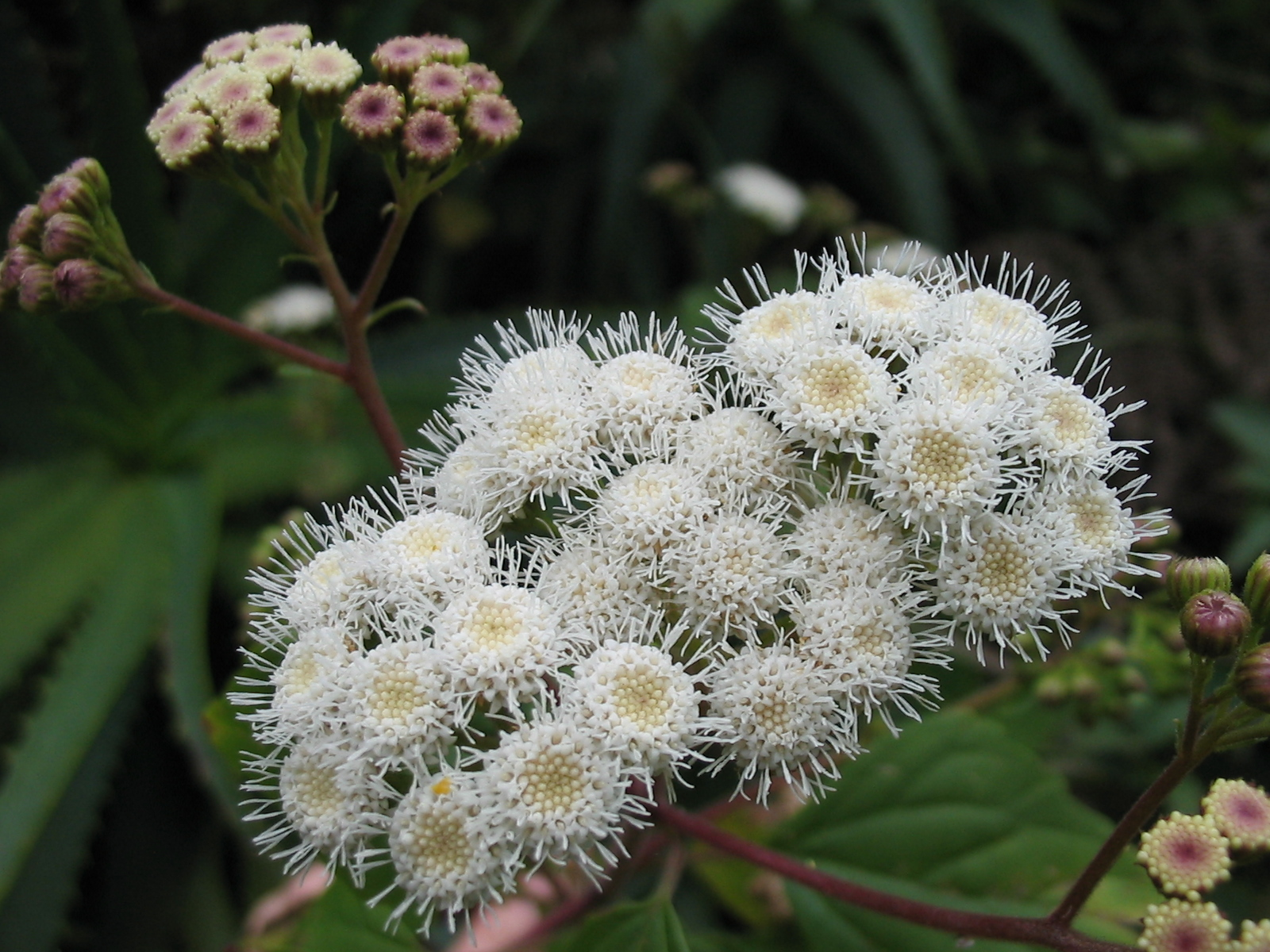 Drüsiger Wasserdost (Ageratina adenophora) - Buds